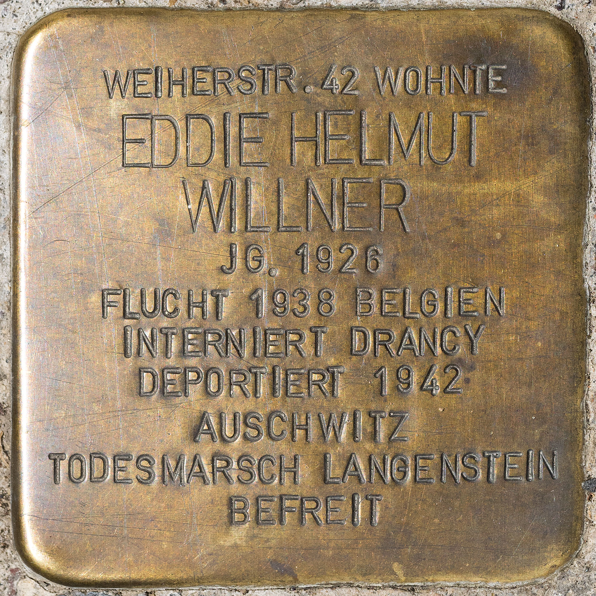 Stolpersteine MG, Willner, Eddie Helmut